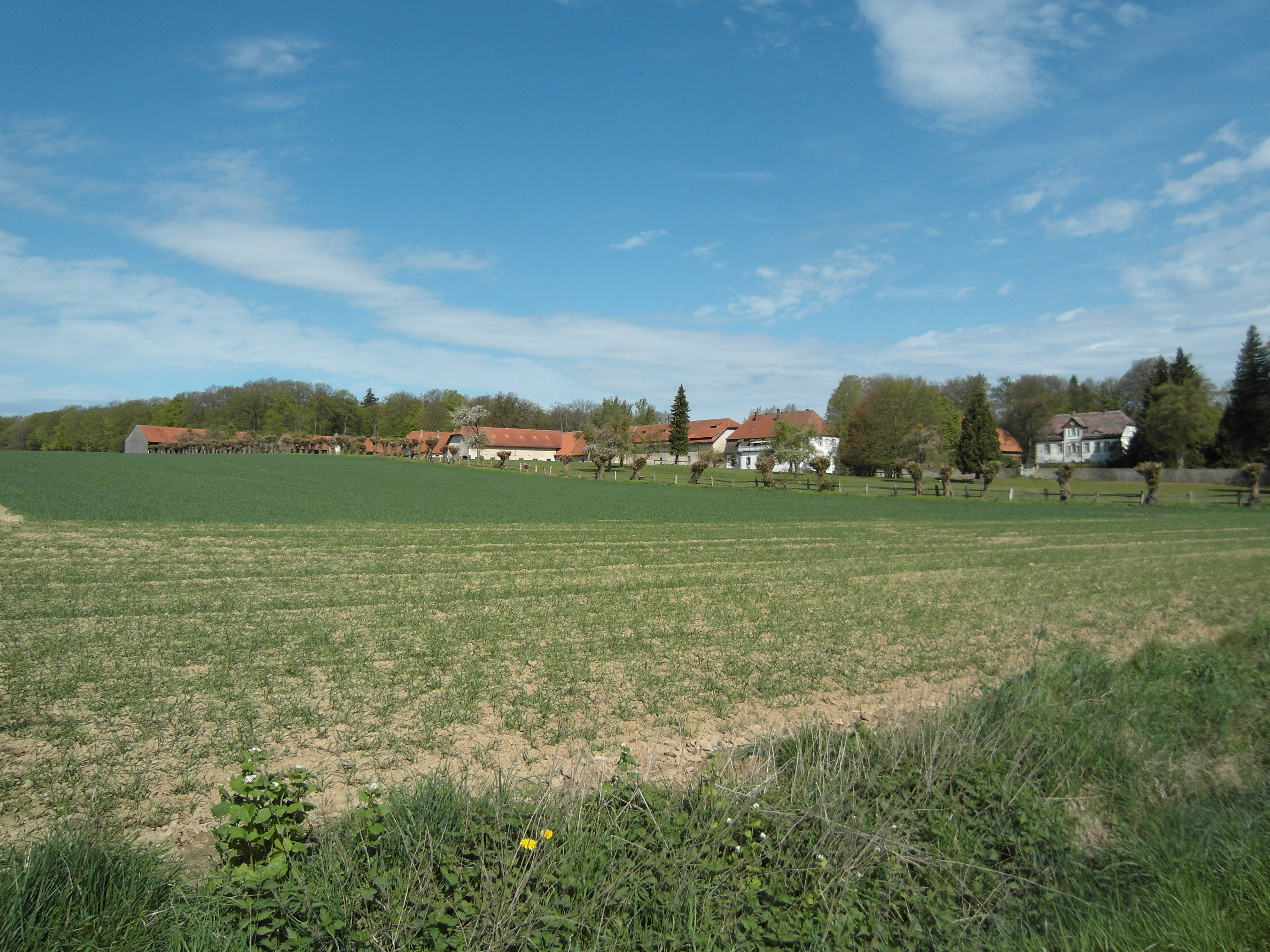 Dieses Foto zeigt das Gut Abbenburg in der Nähe von Bökendorf. This is a photograph of an architectural monument.